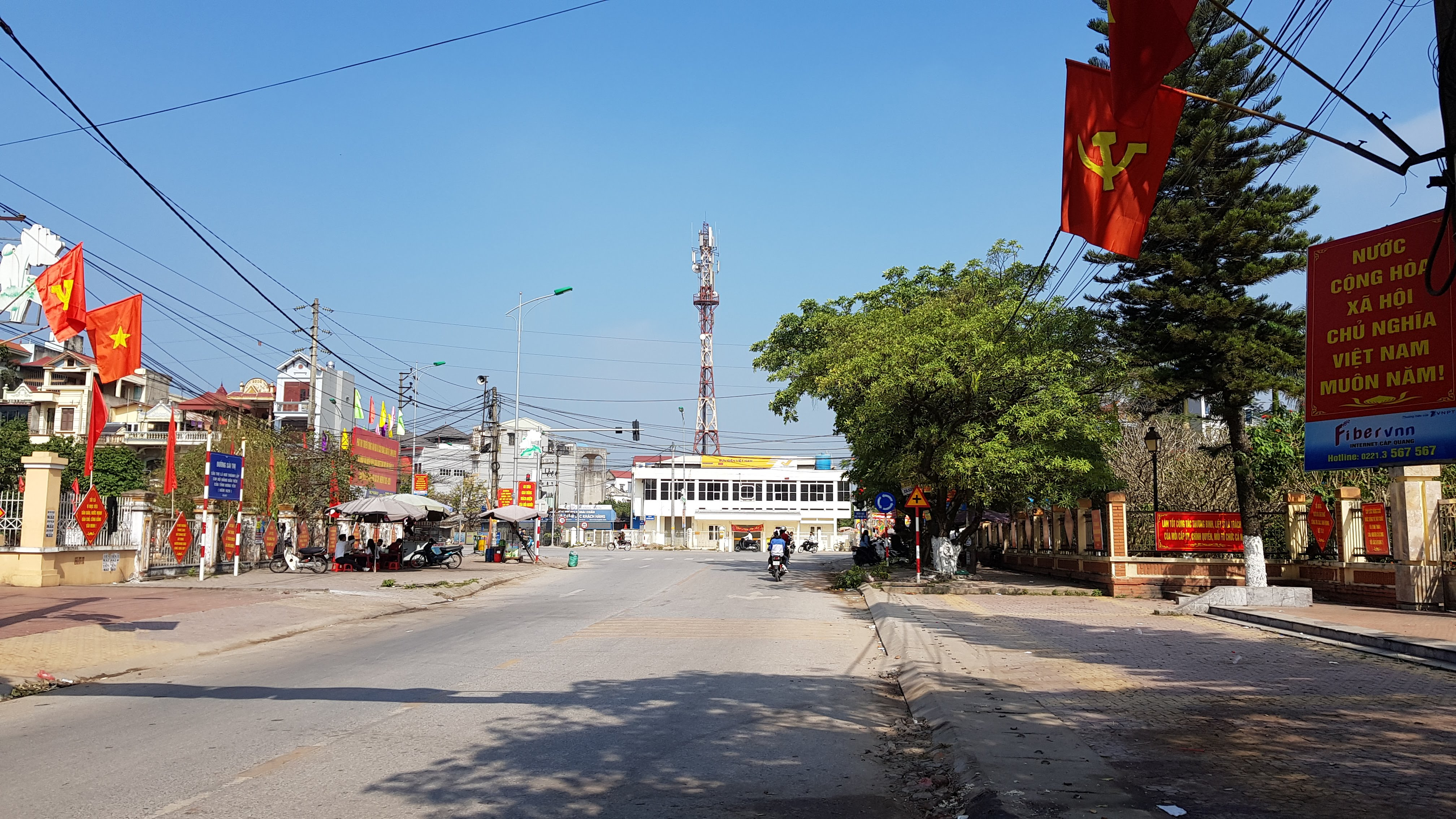 Trung tâm thị trấn Khoái Châu